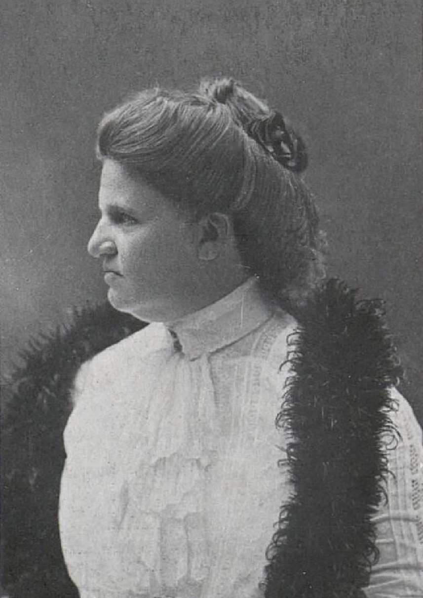 Růžena Čechová, česká prozaička a básnířka